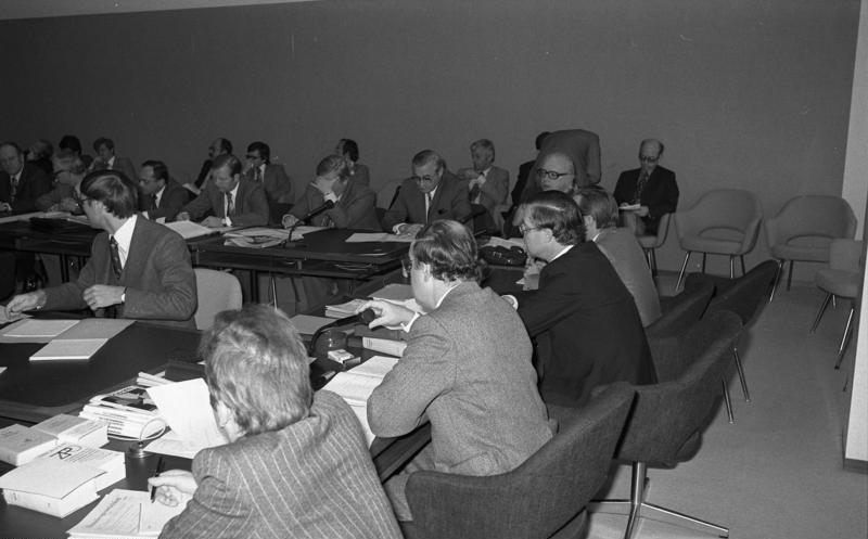 Gemeinsame Sitzung des Rechts- und Innenausschusses des Bujd Bundestags. Thema: Bekämpfung des Terrorismus